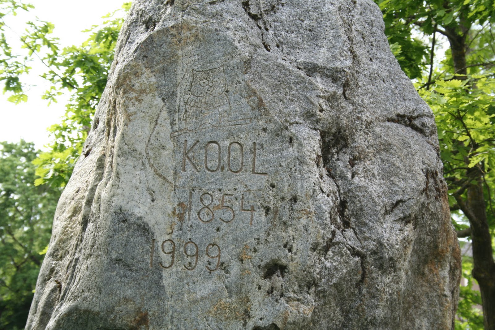 Karinu kooli (1854-1999) mälestuskivi Karinu mõisahoone ees.